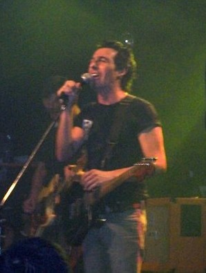 Daniel "Piti" Fernández tocando con La Franela